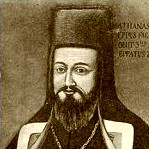 Atanasie Rednic (născut la începutul anului 1722 în satul Giulești, Maramureș și decedat la 2 mai 1772, la Blaj) a fost episcop al Bisericii Române Unite cu Roma.